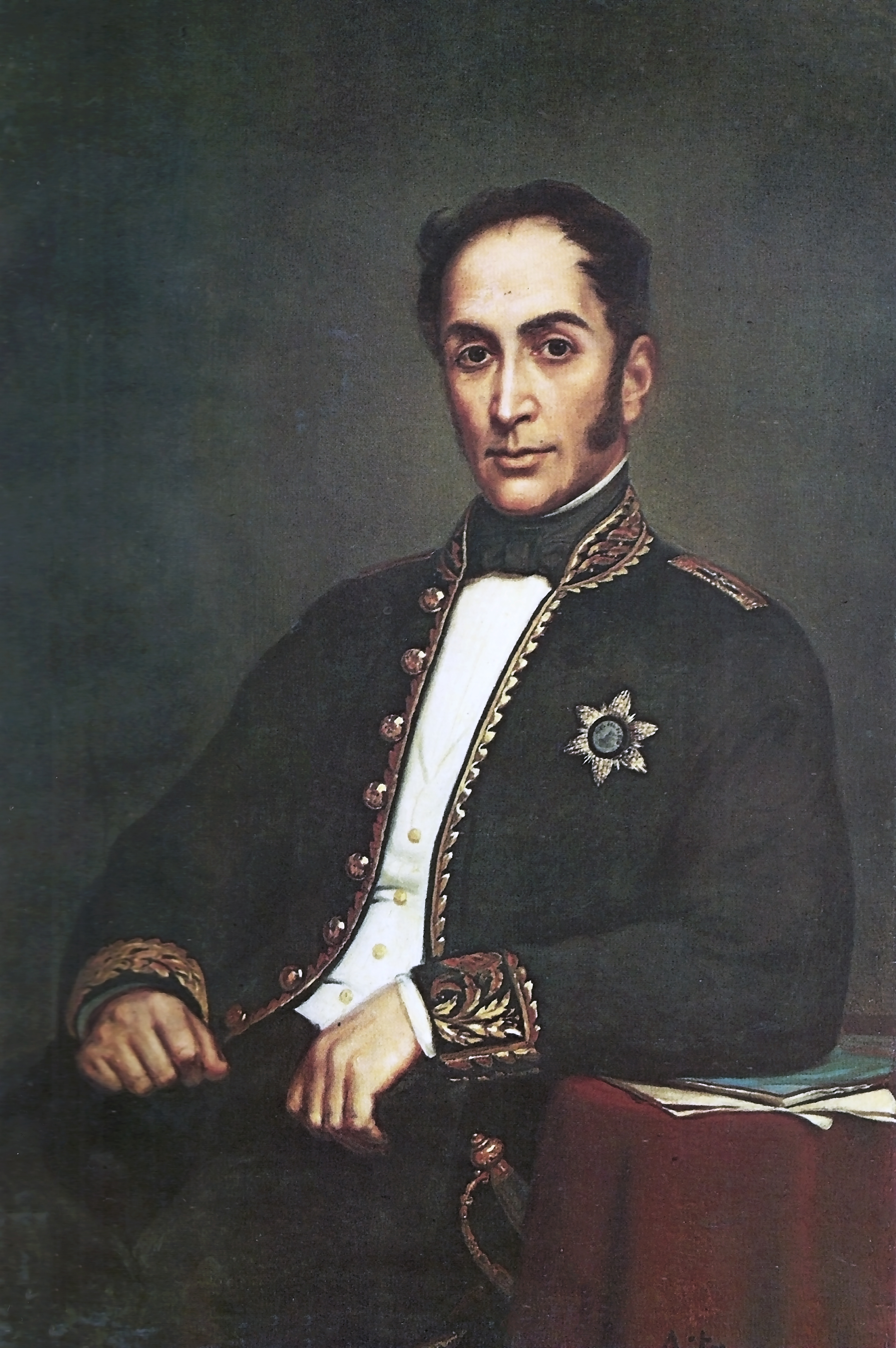 El Libertador (Bolívar diplomático) 1860 óleo sobre tela 107 x 69 de Aita (seudónimo de Rita Matilde de la Peñuela) (1840-?) Localizado en la colección de arte del Banco Central de Venezuela. Caracas - Venezuela. Este retrato ha servido de modelo para el diseño de del billete de 100 Bs. de fecha de elisión enero 29, 1980, también fue modelo para el diseño del actual billete de 100 BsF. De fecha de emisión de Marzo 20 2007